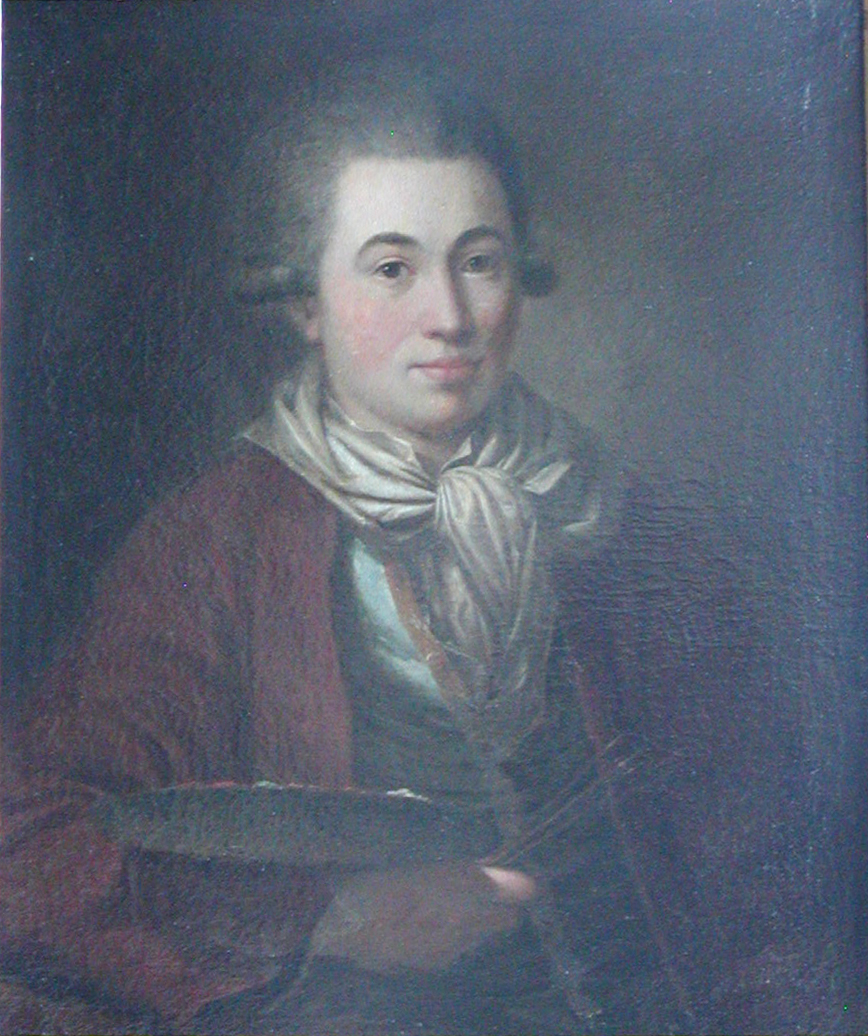 Self-portrait